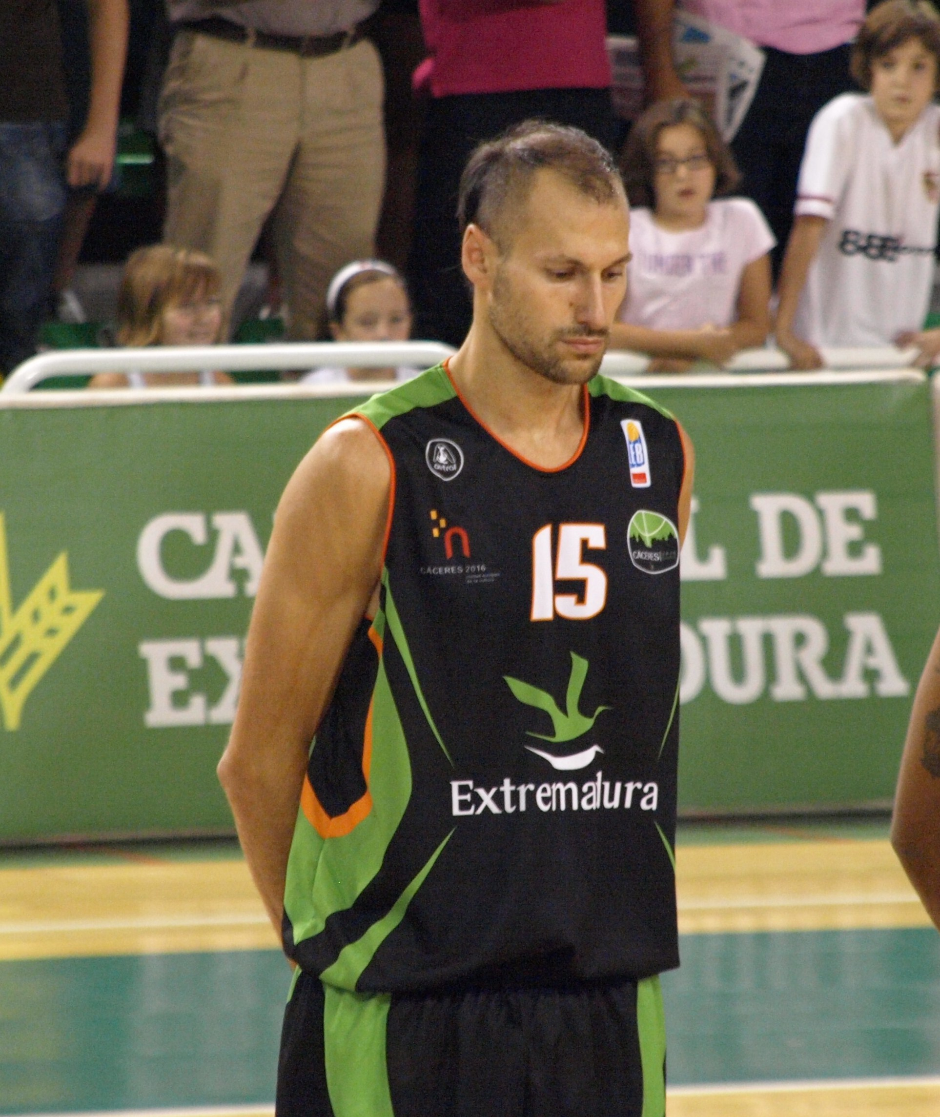 Lucio Angulo Espinosa, con la camiseta del Cáceres 2016 en el primer partido de la temporada 2008-09 disputado en el Pabellón Multiusos de Cáceres ante el Autocid Burgos.